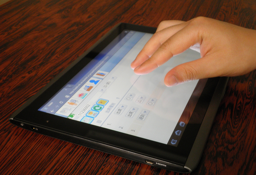 TASKitを使っている様子です